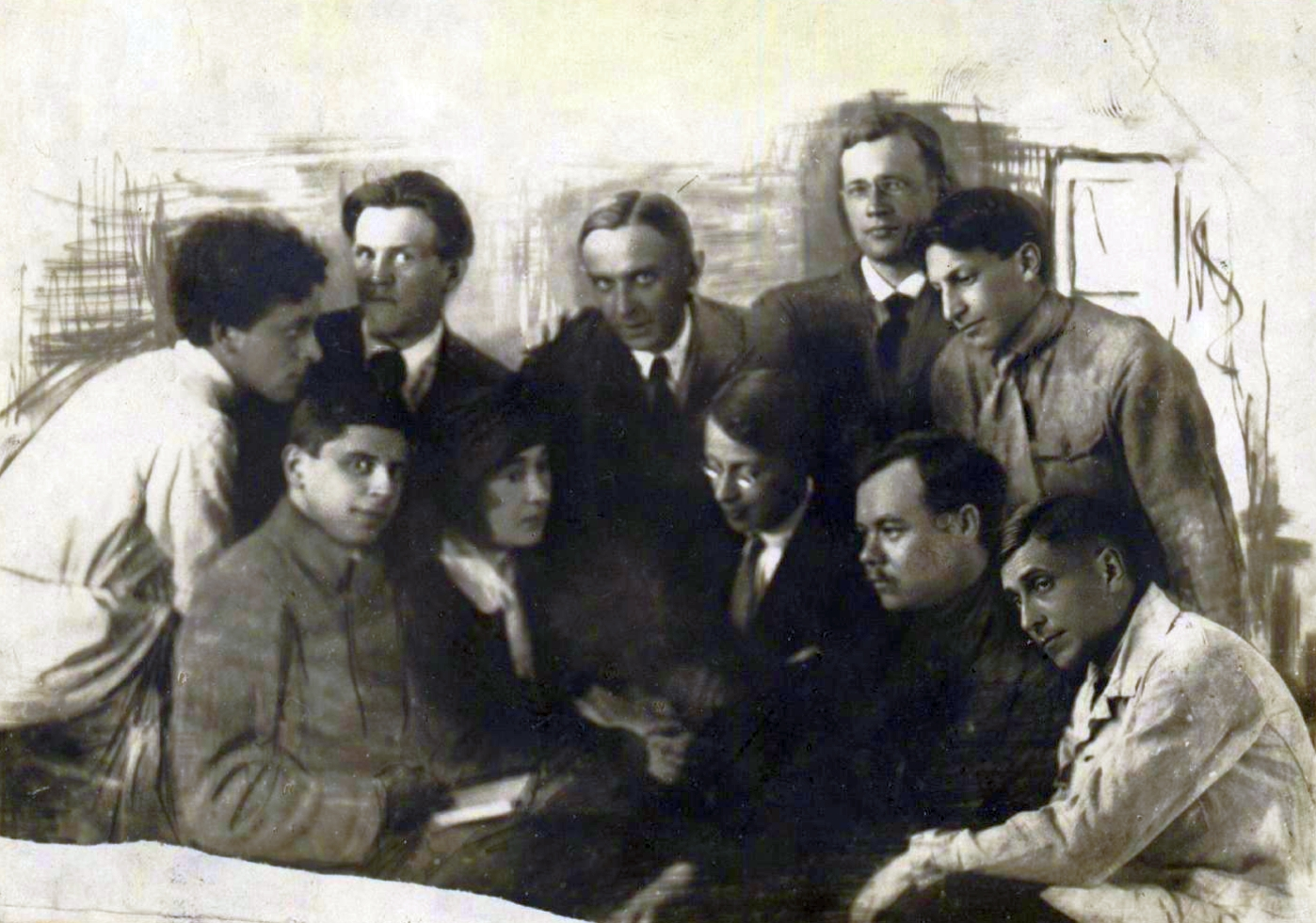 Лунц Л., Фото "Серапионовых братьев", [1920-е], второй ряд, в центре - К. Федин